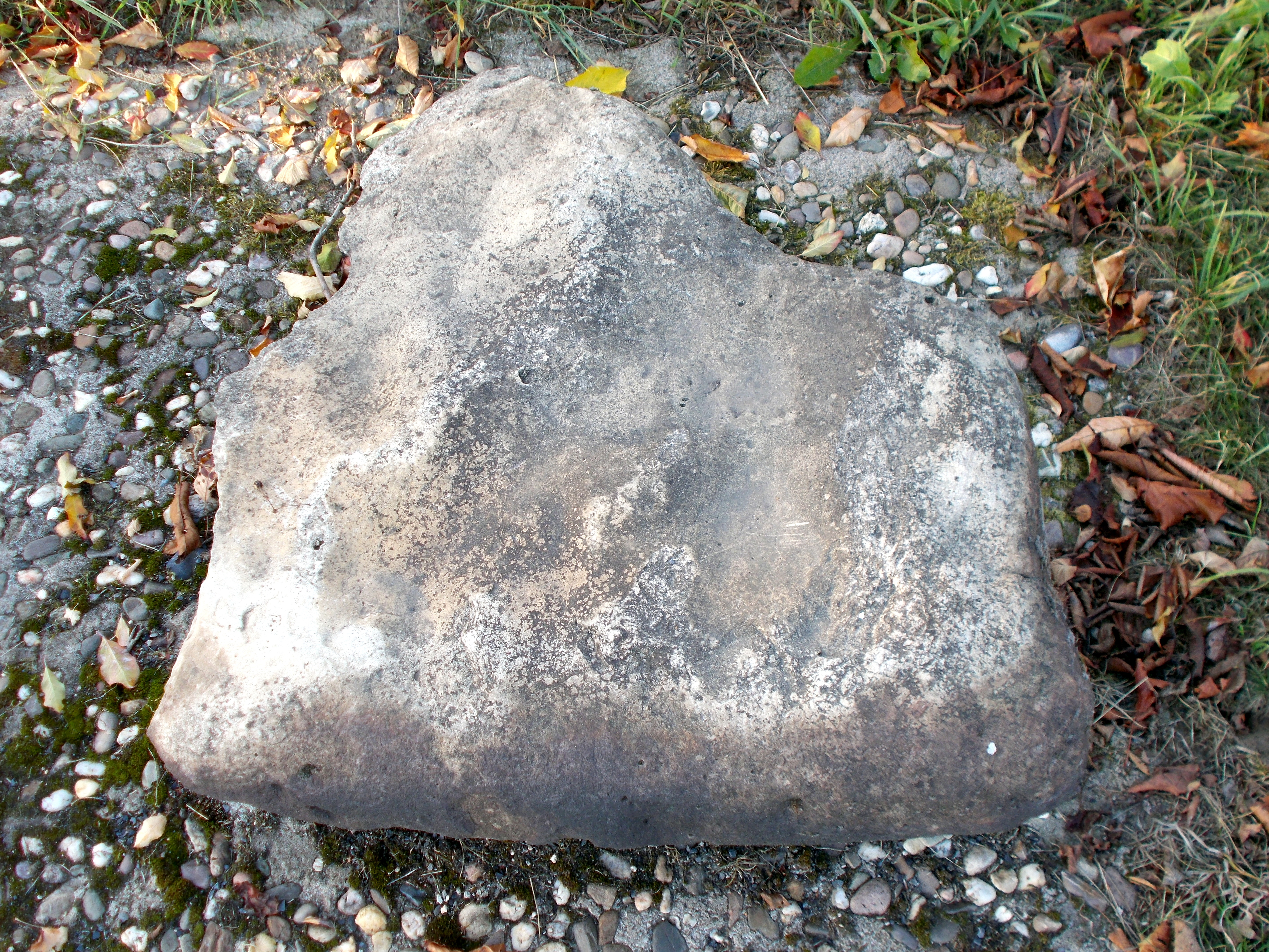 Findlingsweg Sonsbeck Station 4: Dolomit